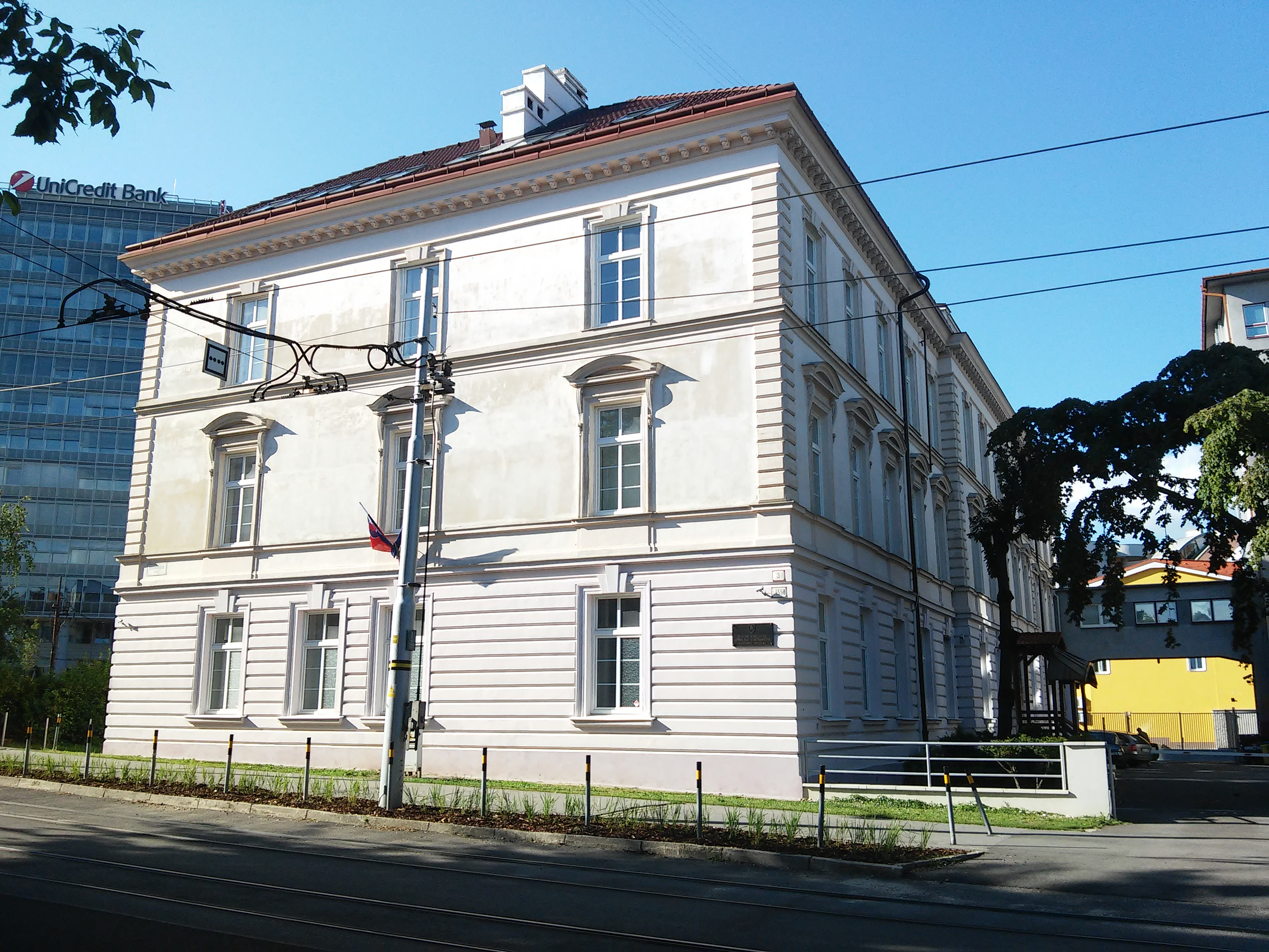 Štefanovičova, Staré Mesto, Bratislava